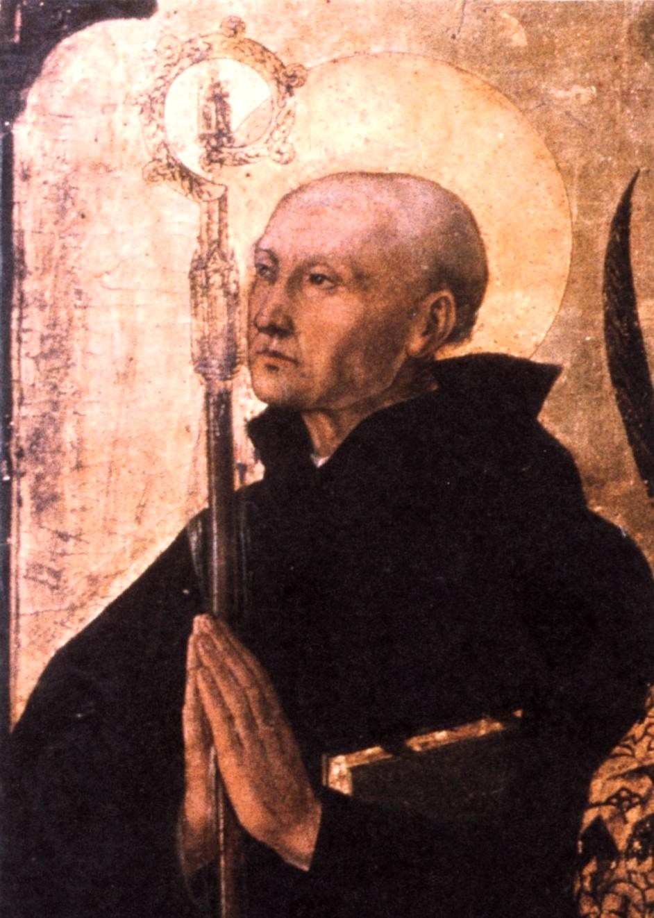 Darstellung des Severin von Noricum. (Detail aus dem Severinaltar in Neapel)